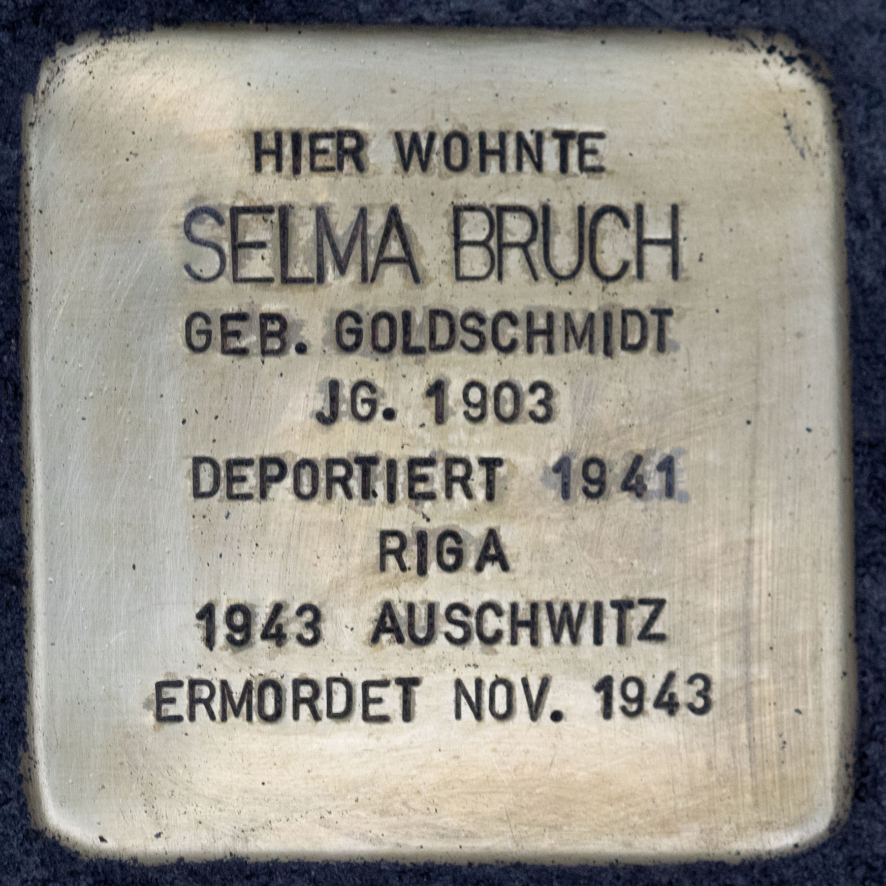 Stolpersteine Kempen: Selma Bruch